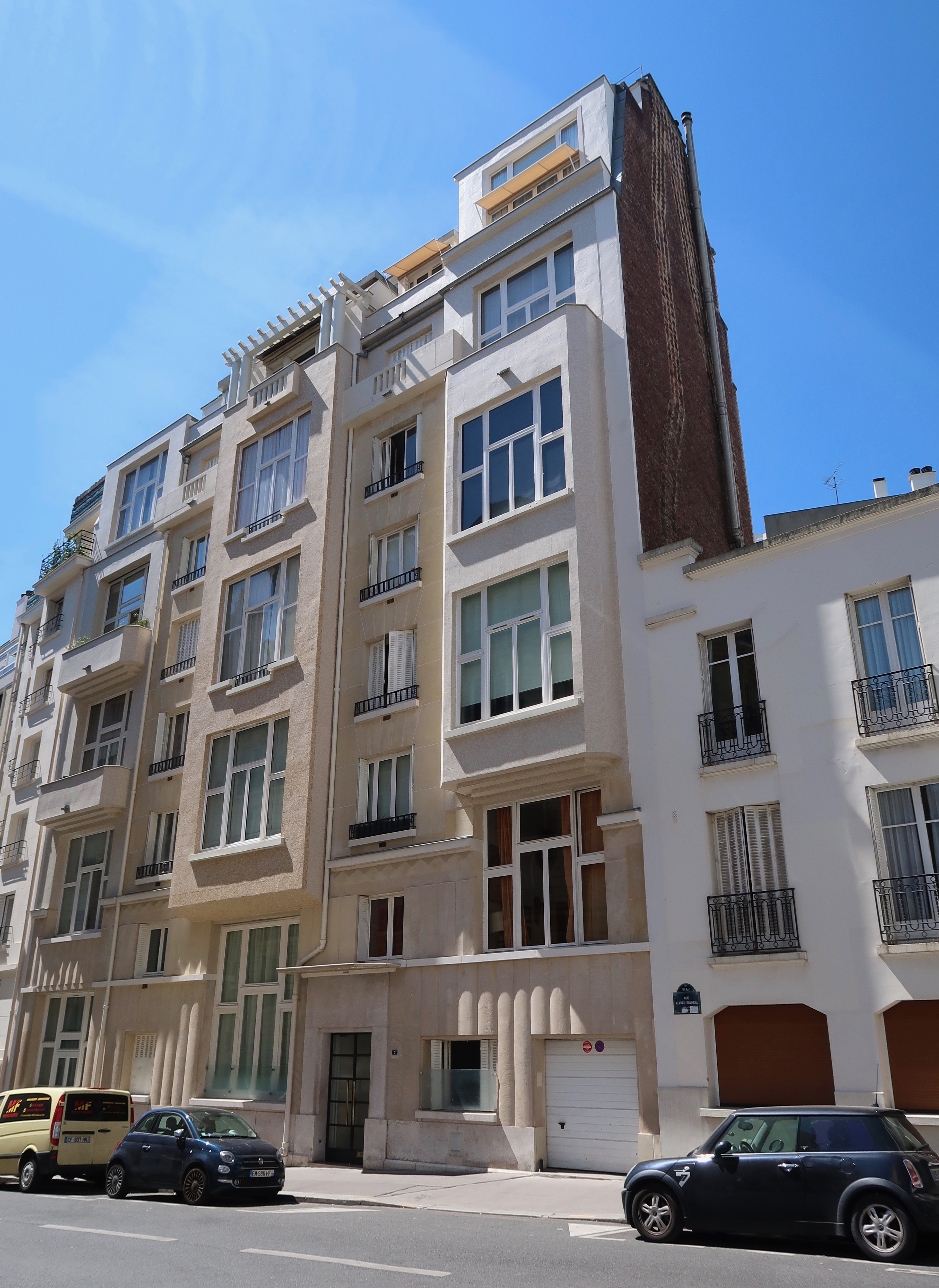 7 rue Alfred-Bruneau (Paris, 16e).